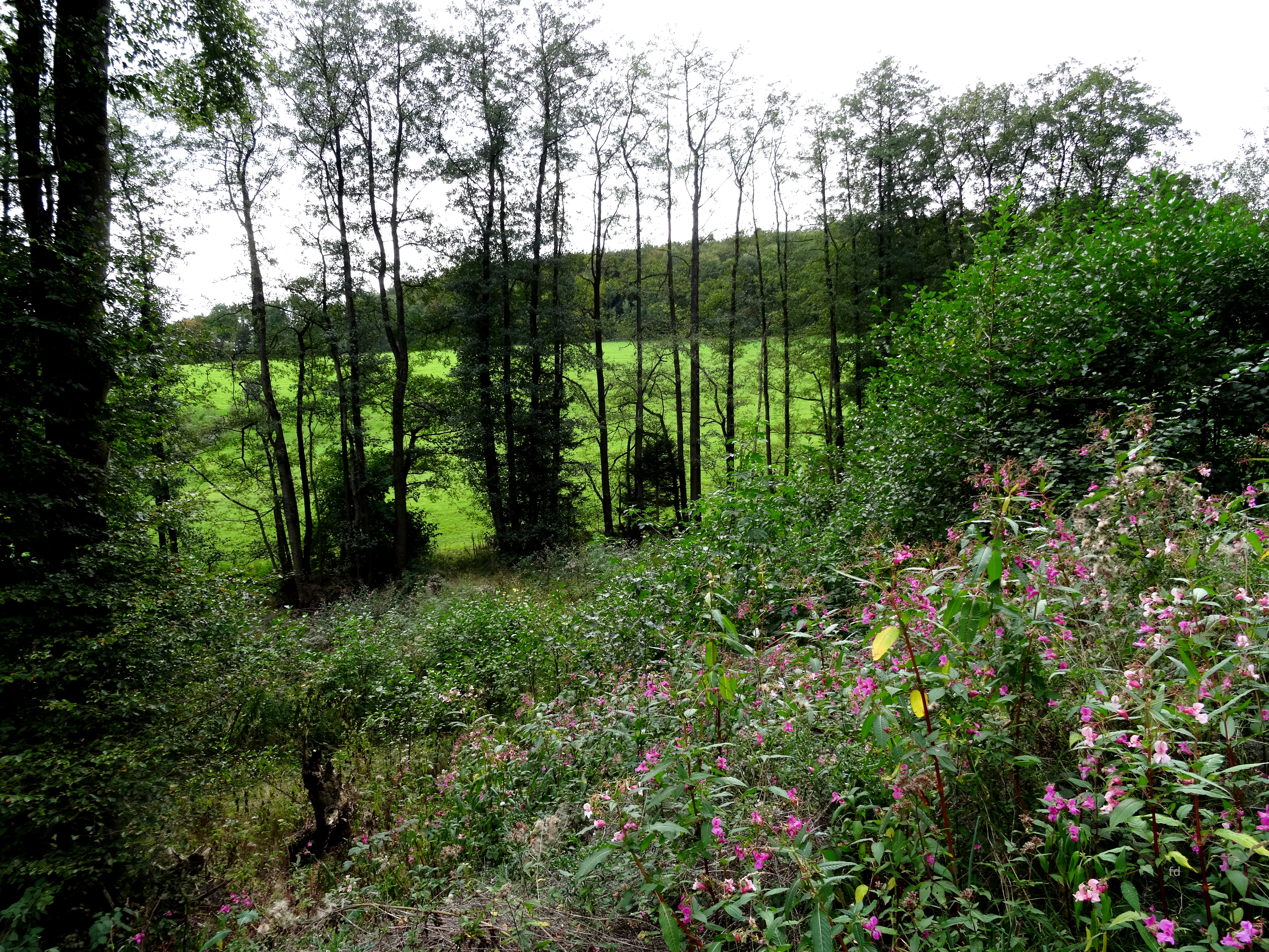 Blick ins Tal der Kleinen Steinmecke (Naturschutzgebiet „Kleines Steinmecketal“ in Meschede)